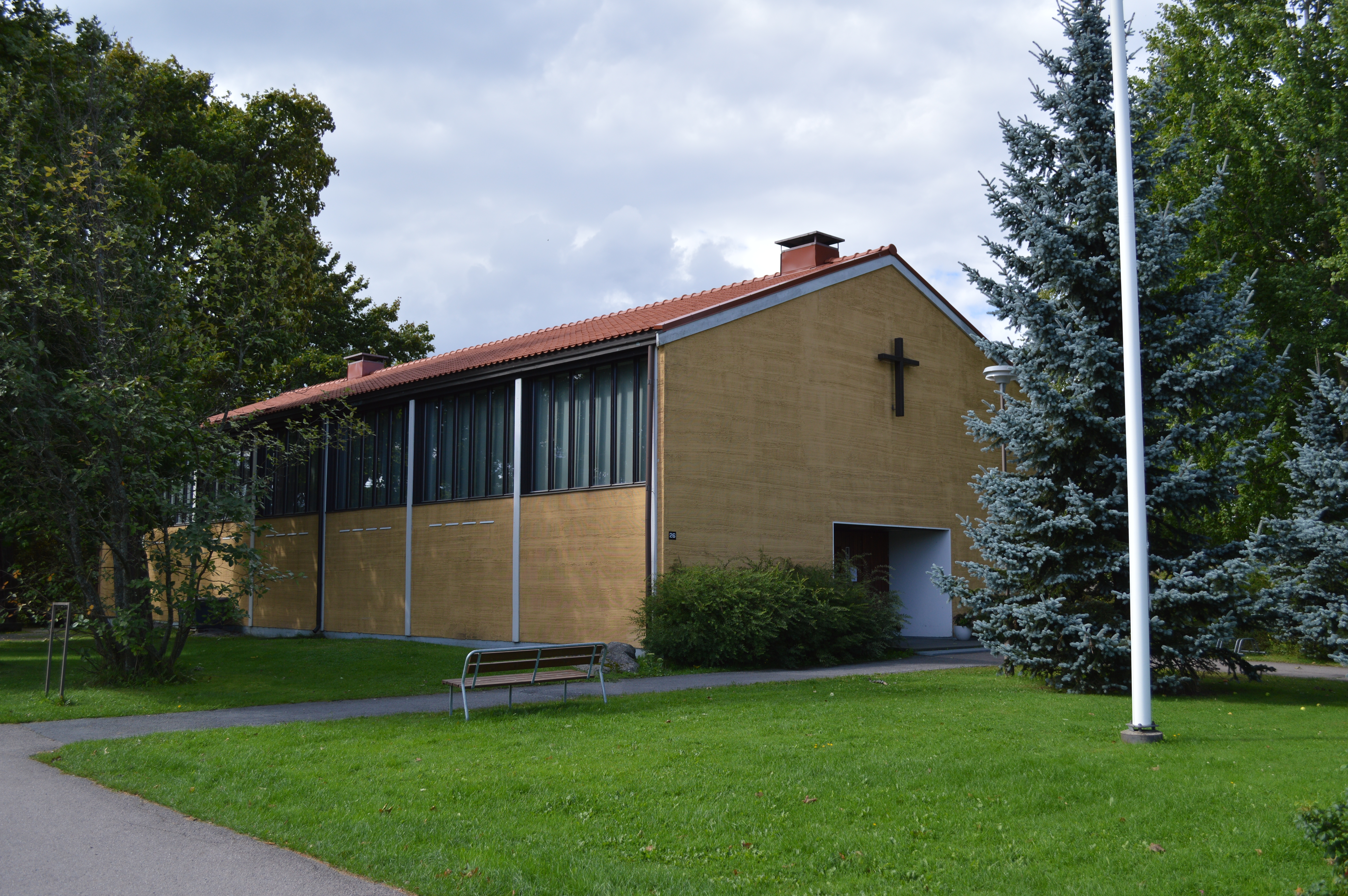 Härmälän kirkko